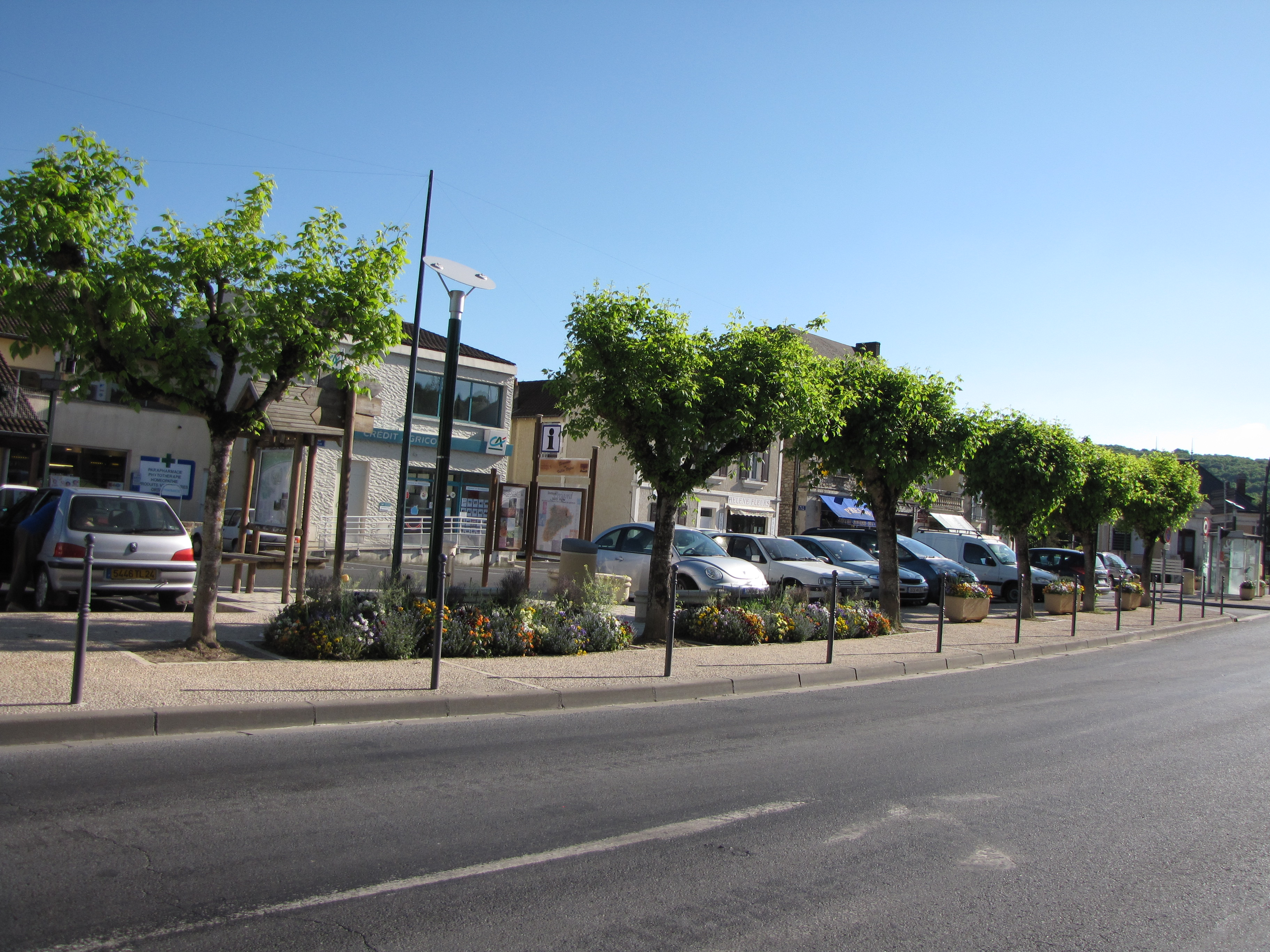 La route départementale 6089 (l'ancienne route nationale 89) dans sa traversée du Lardin-Saint-Lazare, Dordogne, France.